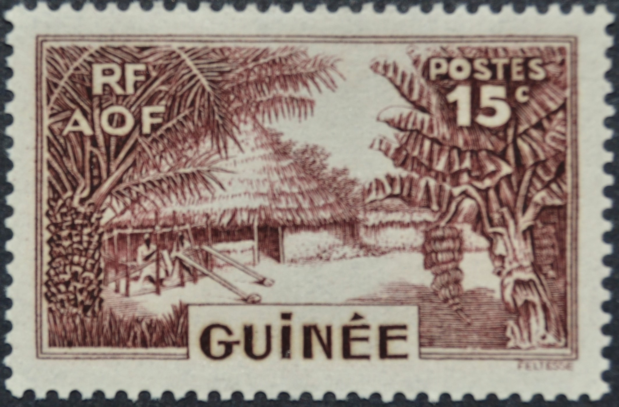 Stamp of French Guinea, 15c, 1938